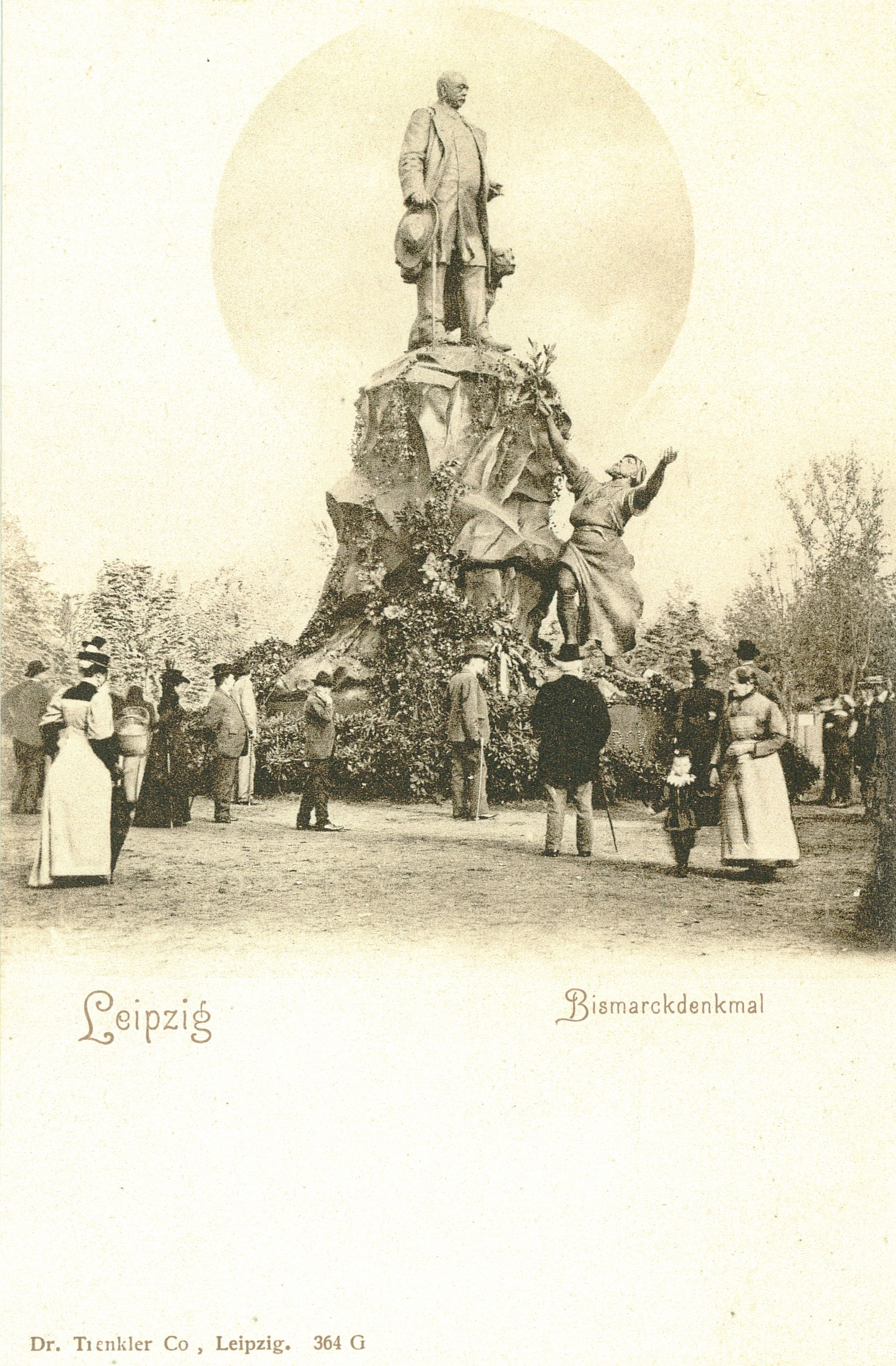 Das Bismarckdenkmal in Leipzig, dargestellt auf einer Postkarte um 1900.